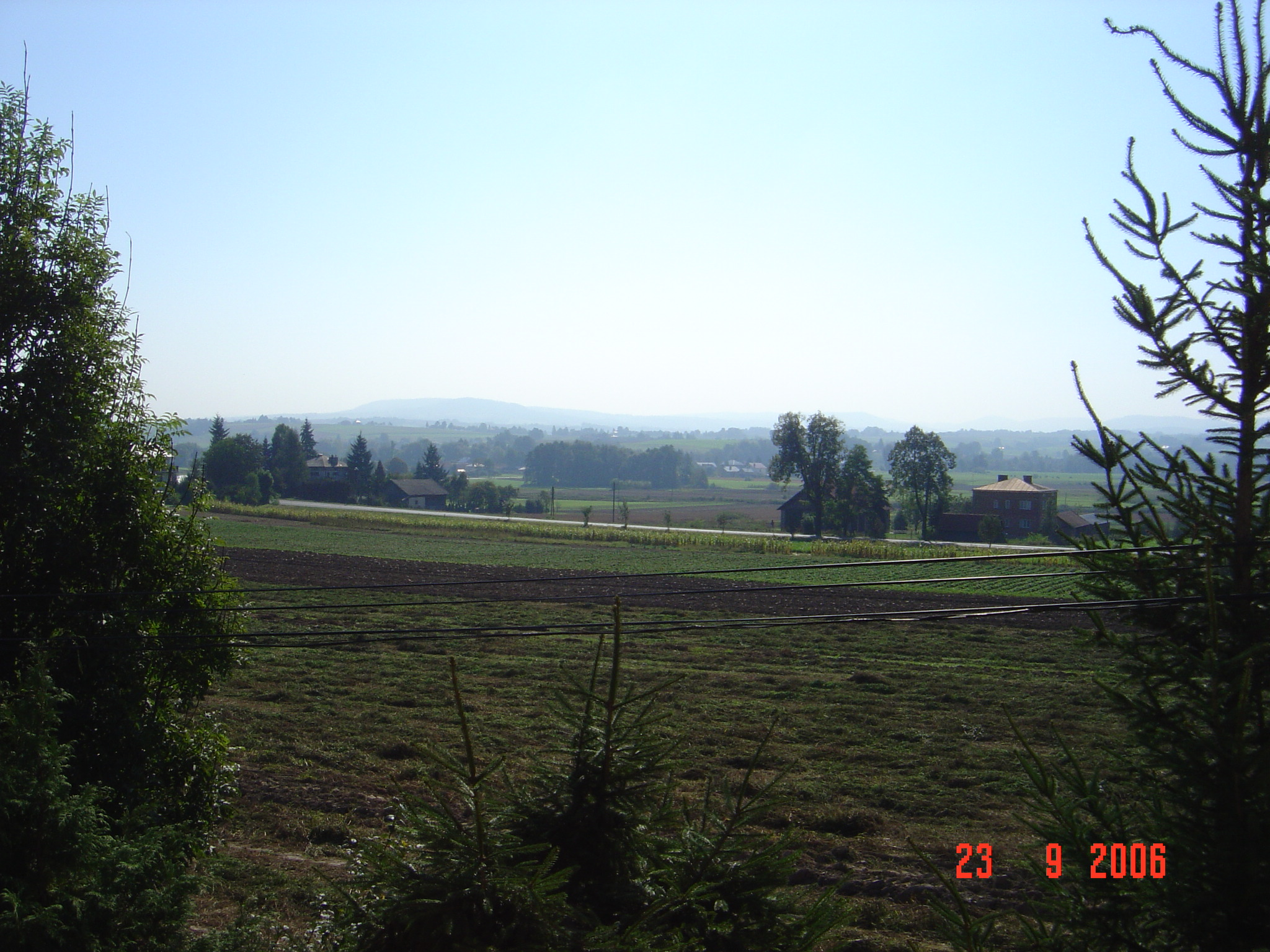 Wieś Kożuchów w województwie podkarpackim, w powiecie strzyżowskim, w gminie Wiśniowa